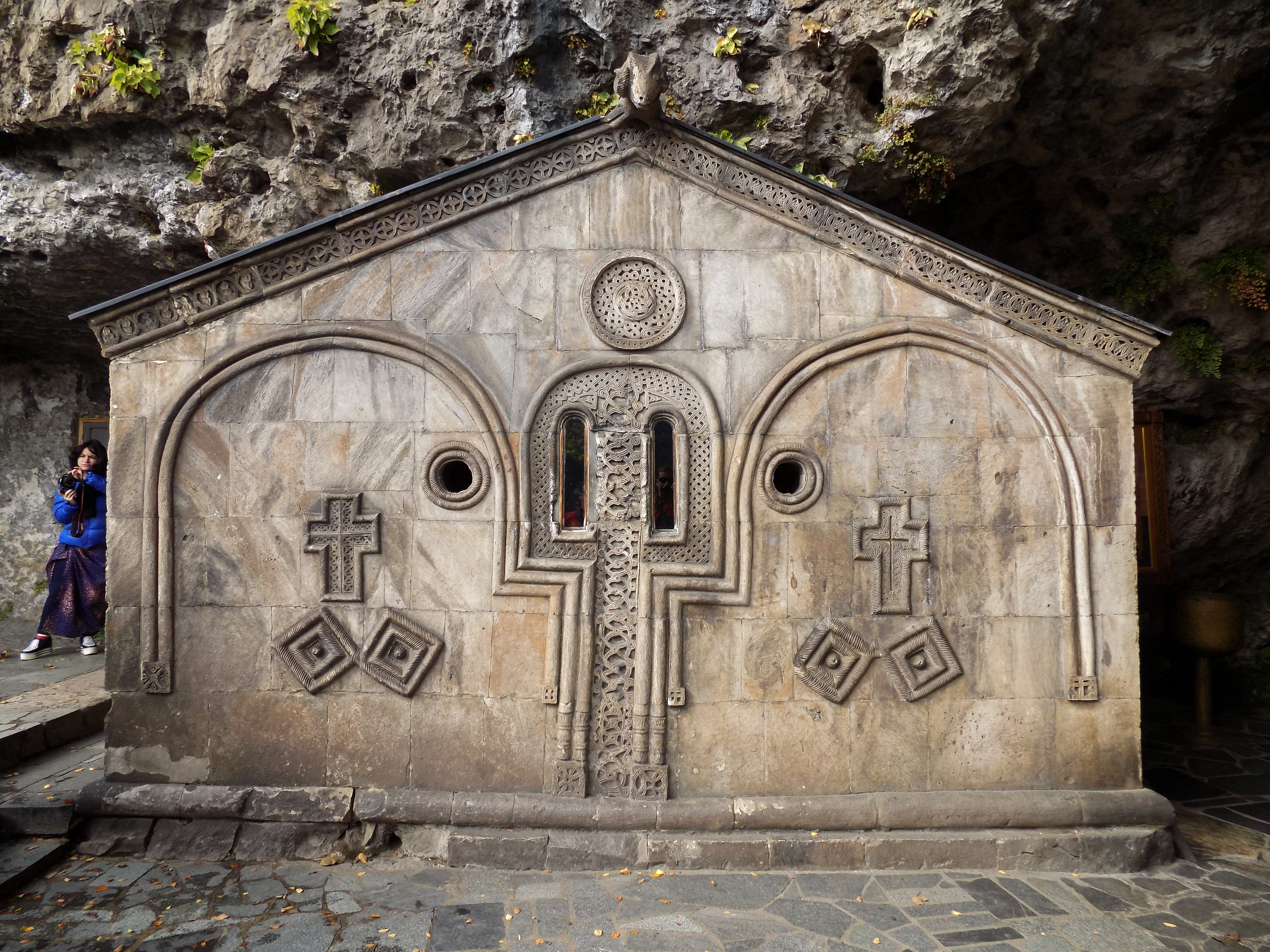 მღვიმევის მონასტერი — მცირე ეკლესია